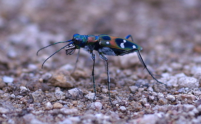 Cicindela japonica from Japan.